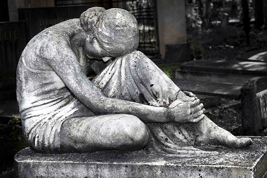 Skulptur Die Trauernde von Margarete Depner auf dem Zentralfriedhof von Hermannstadt/Sibiu